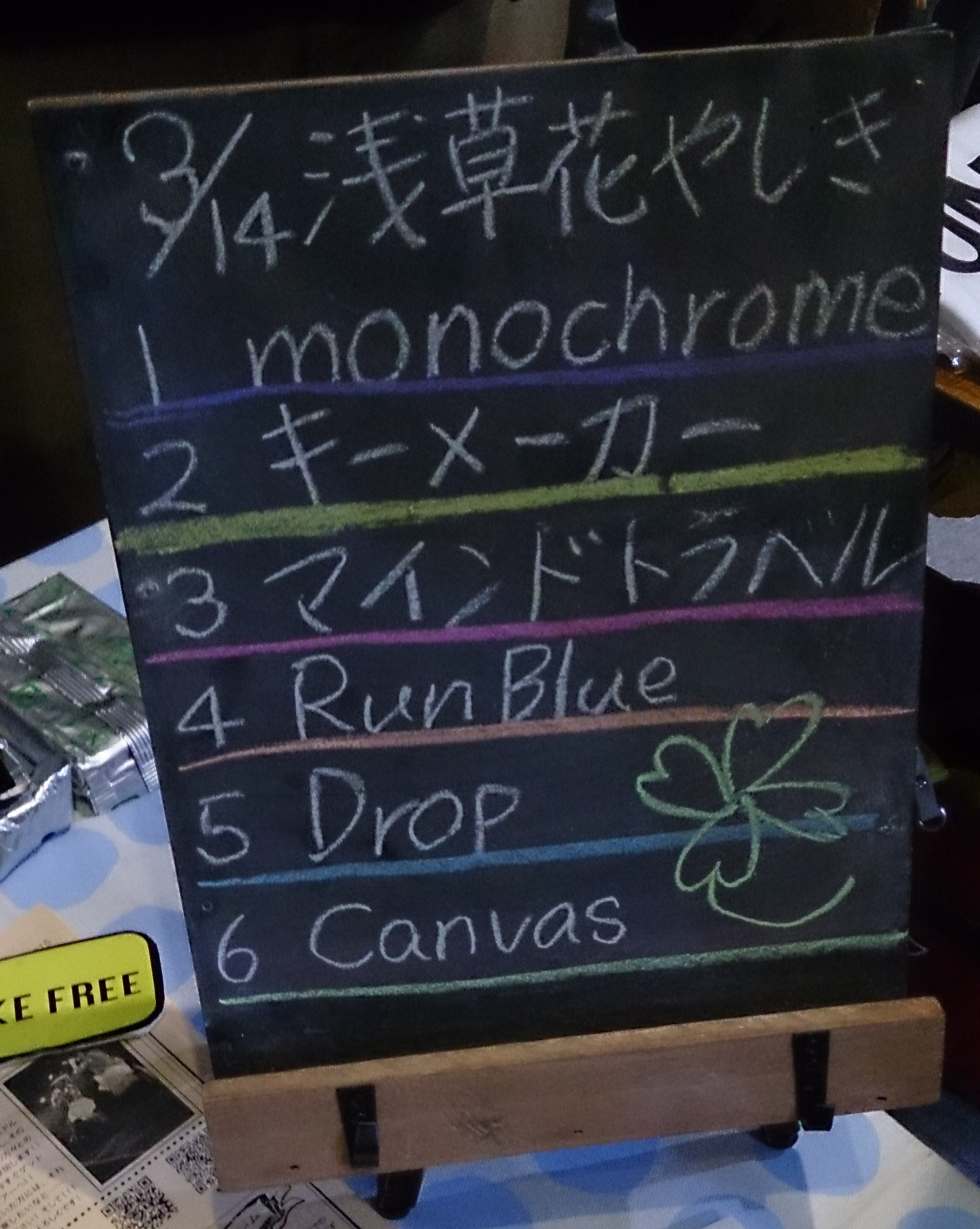 amiinaセトリボード(20150314(1))